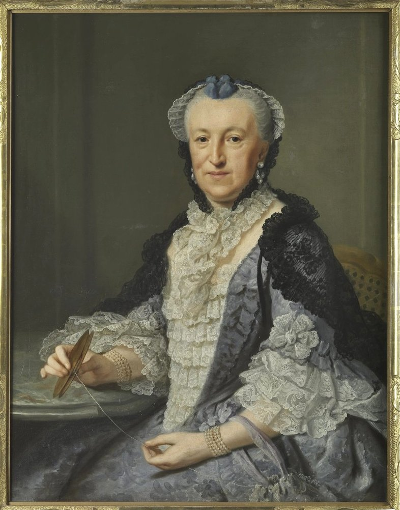 Ziesenis, Johann Georg, Sophie Charlotte von Haus, geb. v. Bennigsen, Hannover, 1770, Saarbrücken, Saarlandmuseum / Stiftung Saarländischer Kulturbesitz, Alte Sammlung, Inventar-Nr. NI 2673, AXLIII-001, Aktenzeichen 10004376, Zugang: 1960.04.06